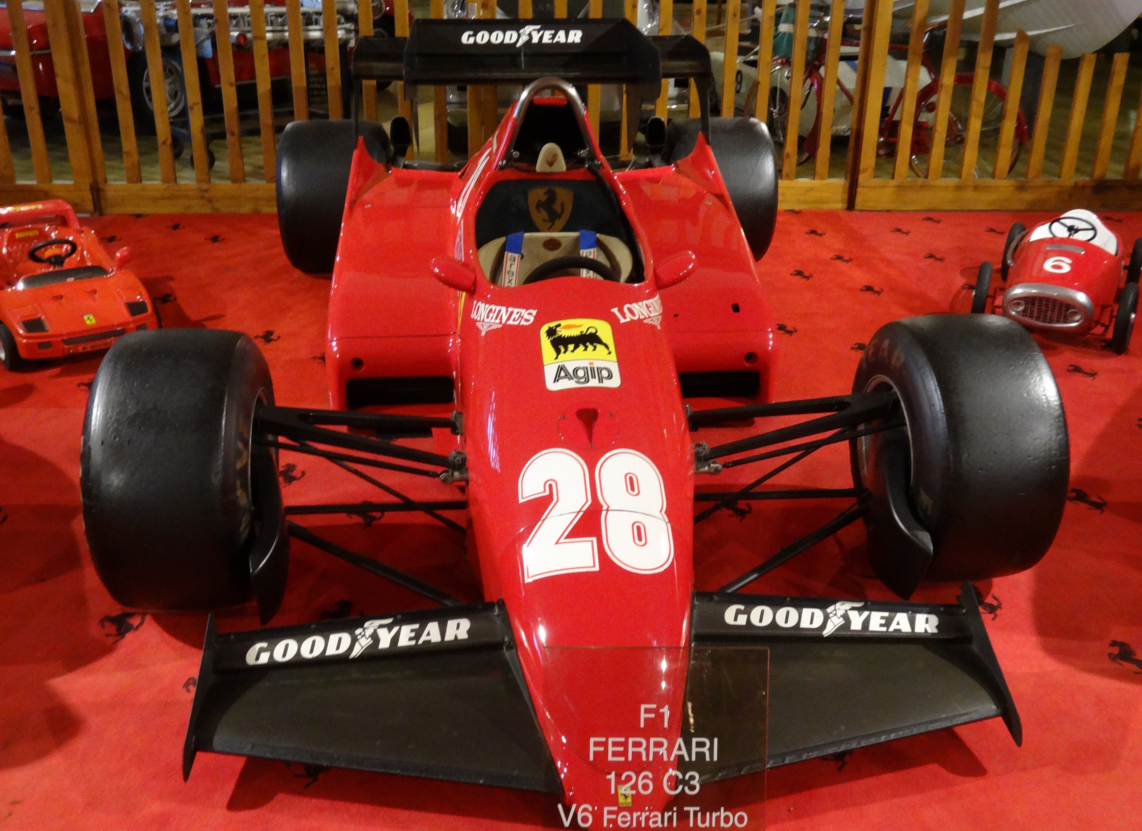 Ferrari F1 126 C3 1.5 '83 650cv